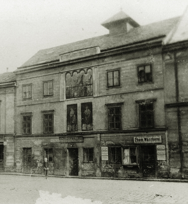 Teatr Sułkowskich w Matzleinsdorf